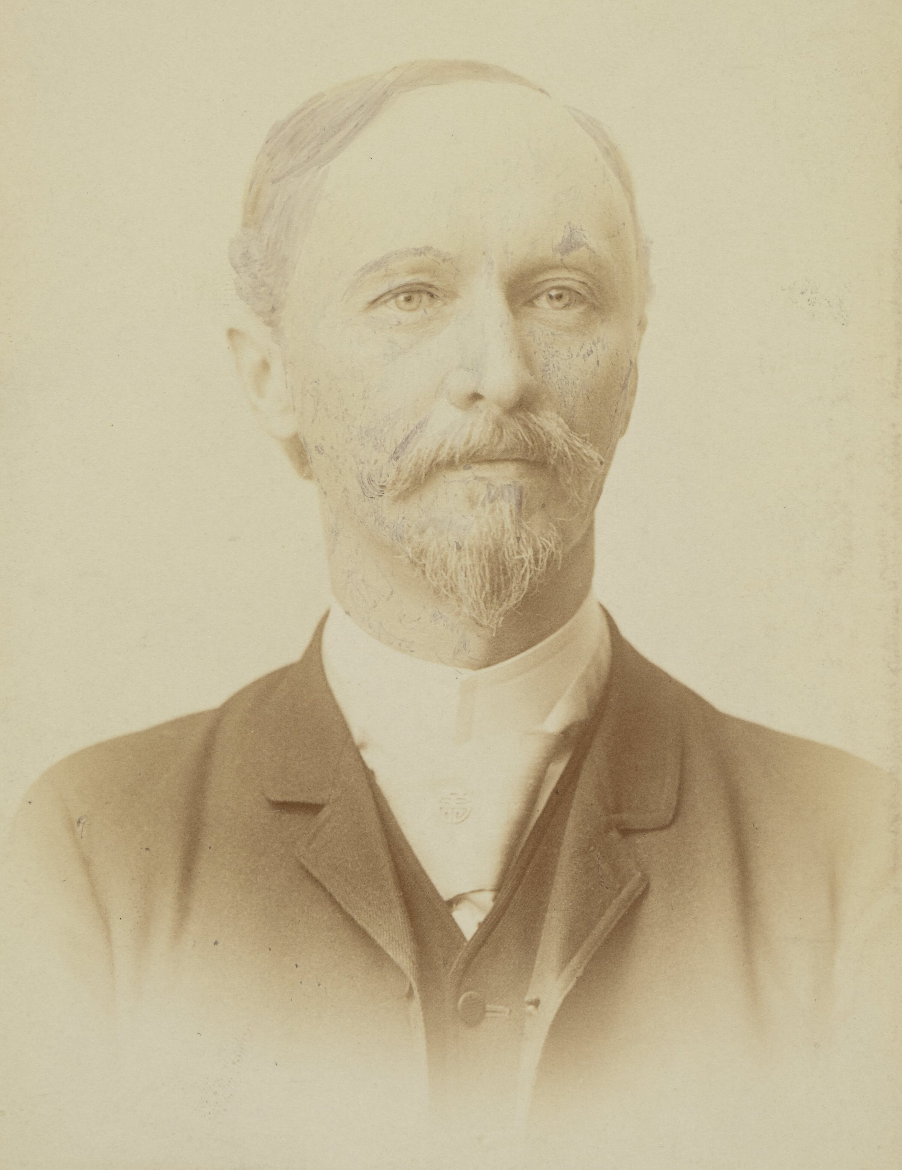 Edward Janczewski, 1894 r.